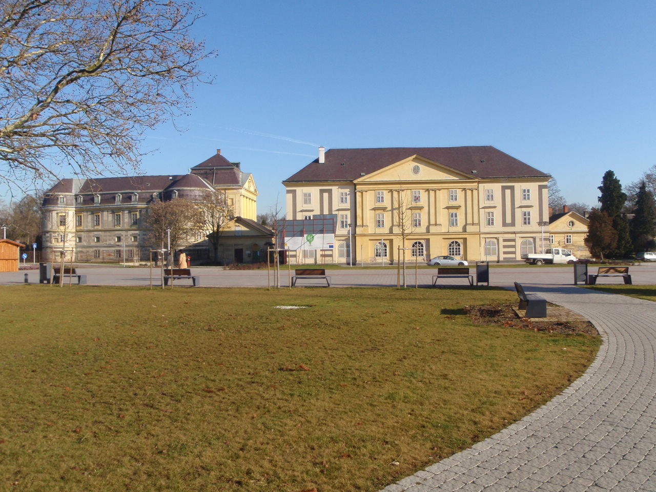 Körmend áépített Fő tér a Batthyány kastéllyal